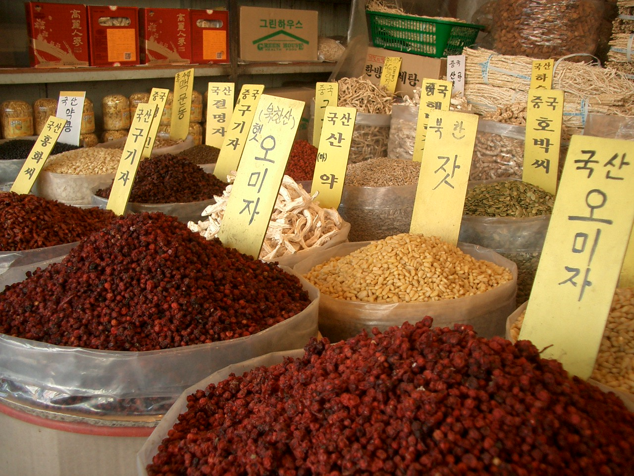 서울 제기동 경동시장의 모습 Herbs in Kyungdong Market, Jegidong, Seoul, Korea